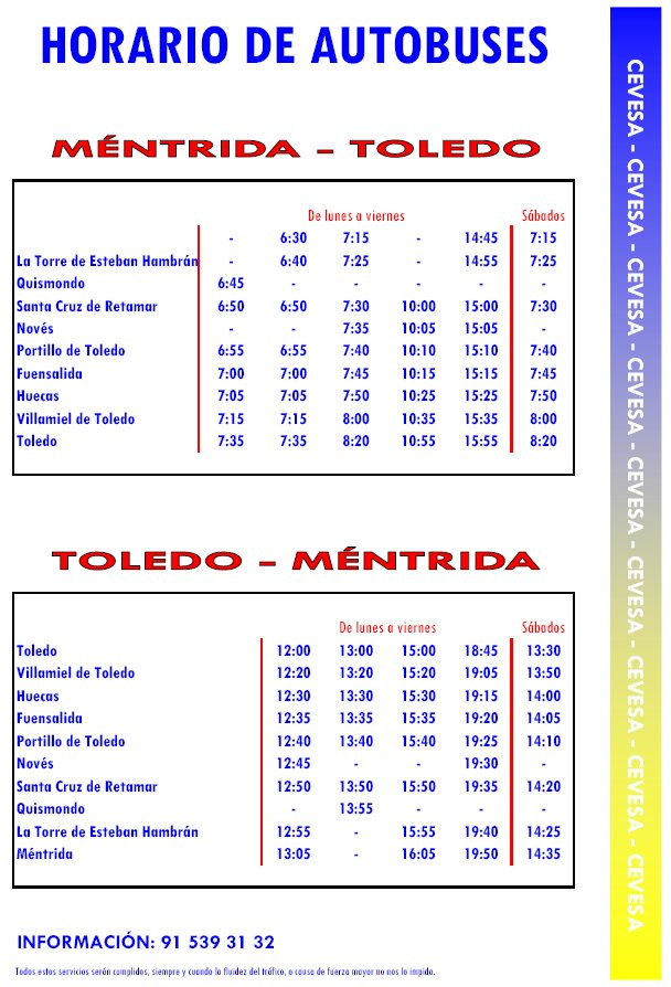 Horarios de Mentrida a Toledo y viceversa